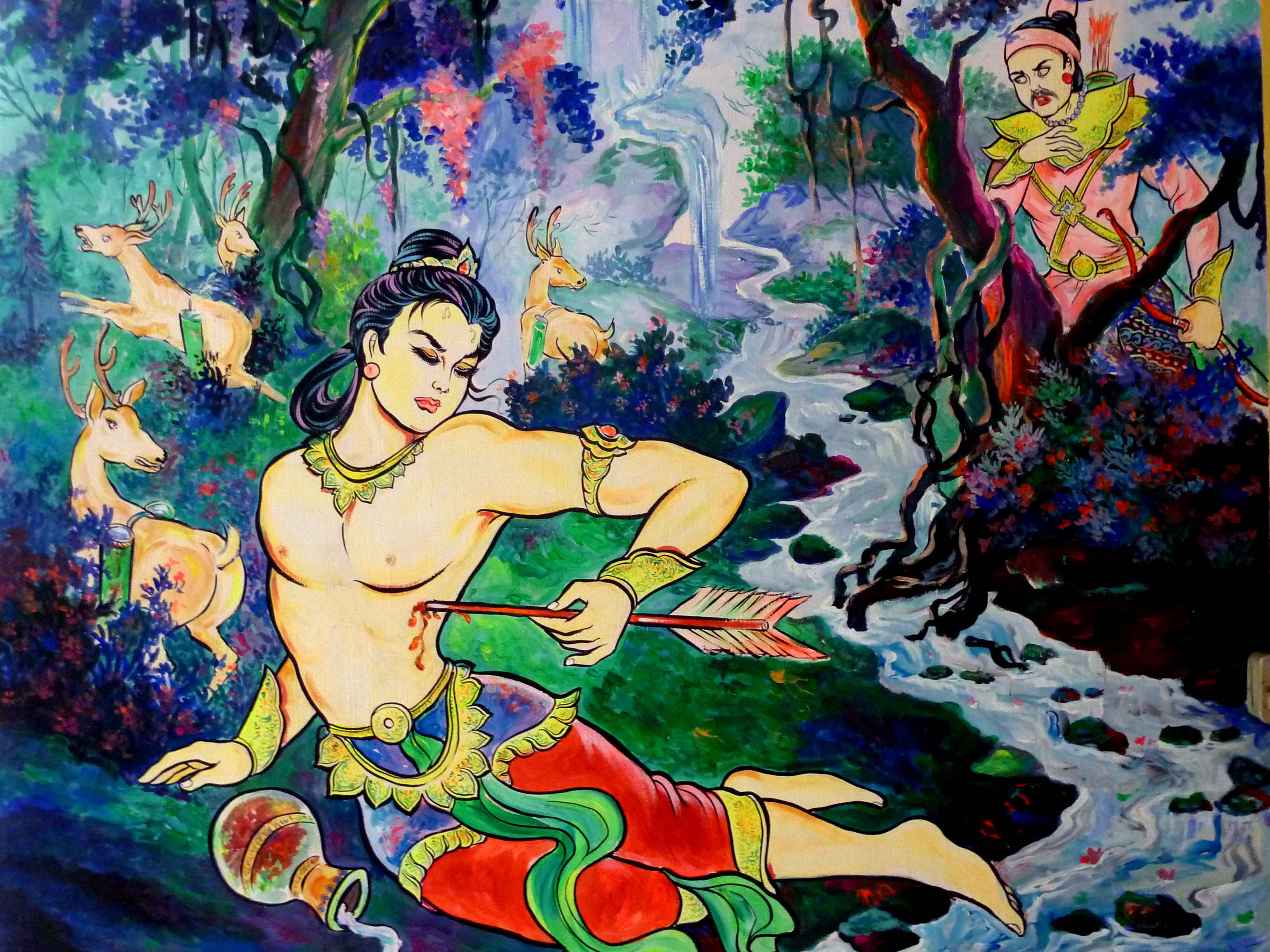 011 Suvannasamajataka, at Wat Olak Madu, Kedah